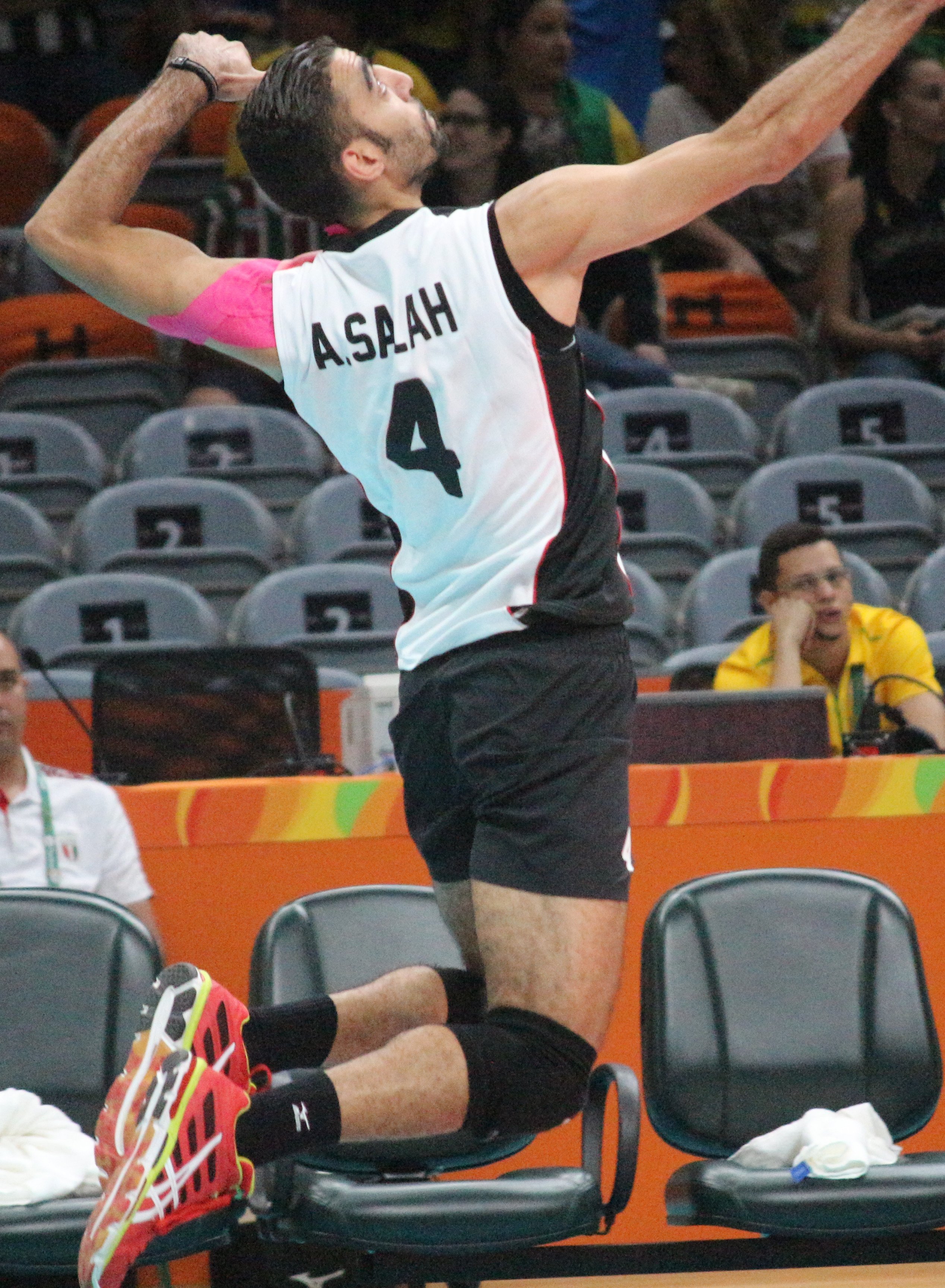 Vôlei de Quadra - Egito - Jogos Olímpicos Rio 2016